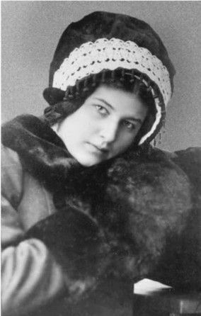 Larisa Michajlovna Rejsner (1895-1926)